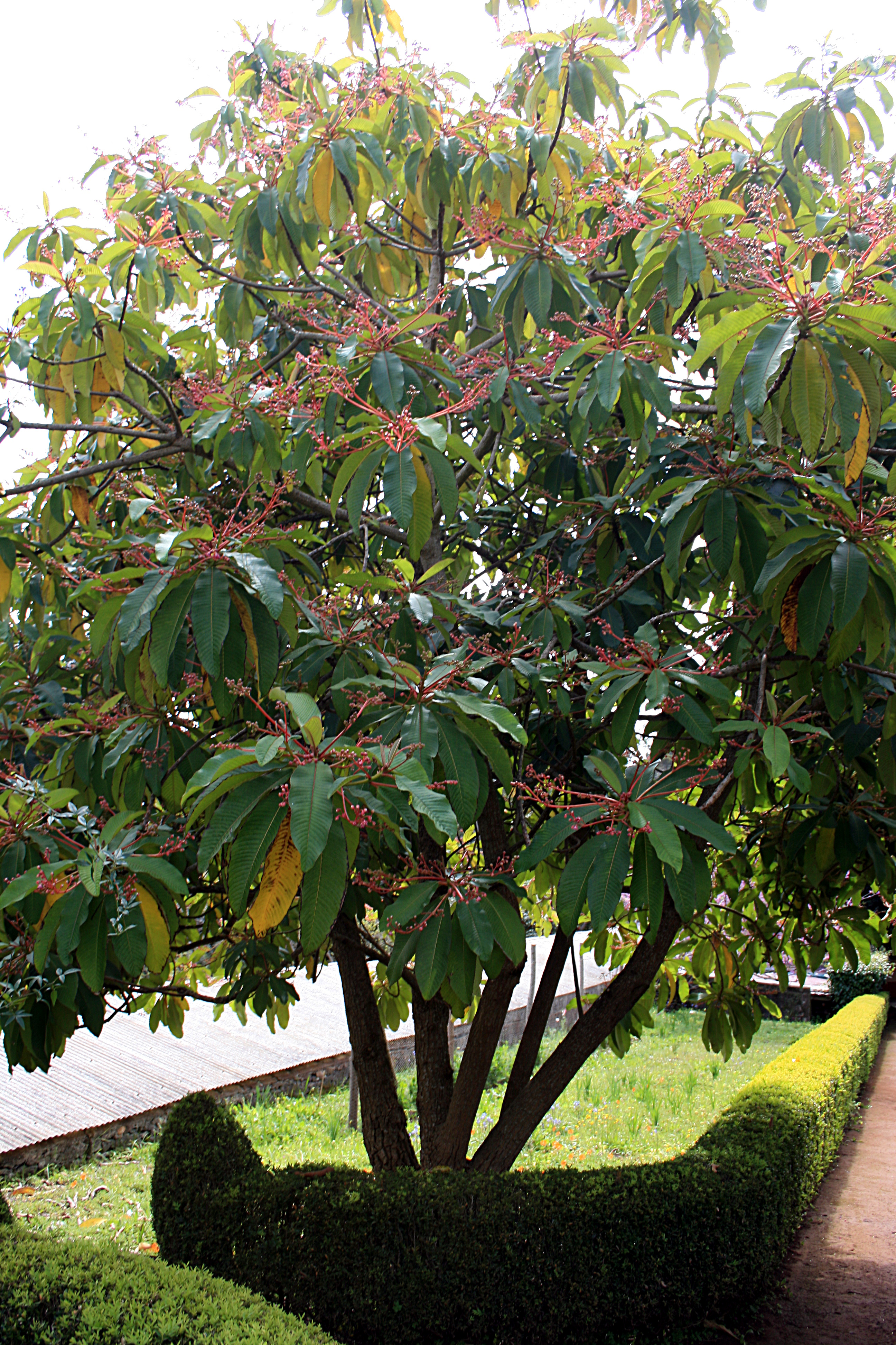 Madeira,_Palheiro_Gardens_-_Saurauia_subspinosa